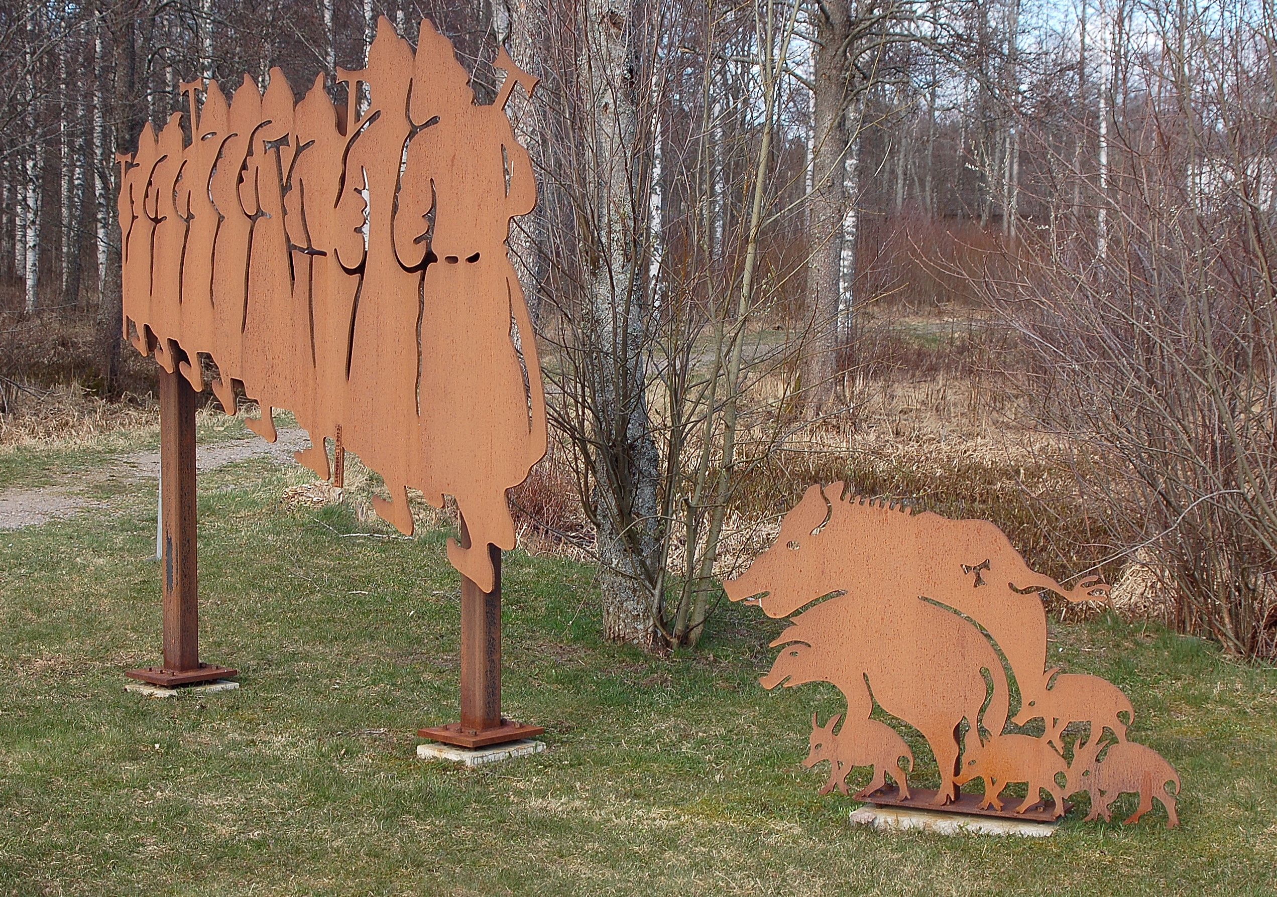 Konstverk med munkar och vildsvin av Linda Disley placerat vid Borasjön Laxå